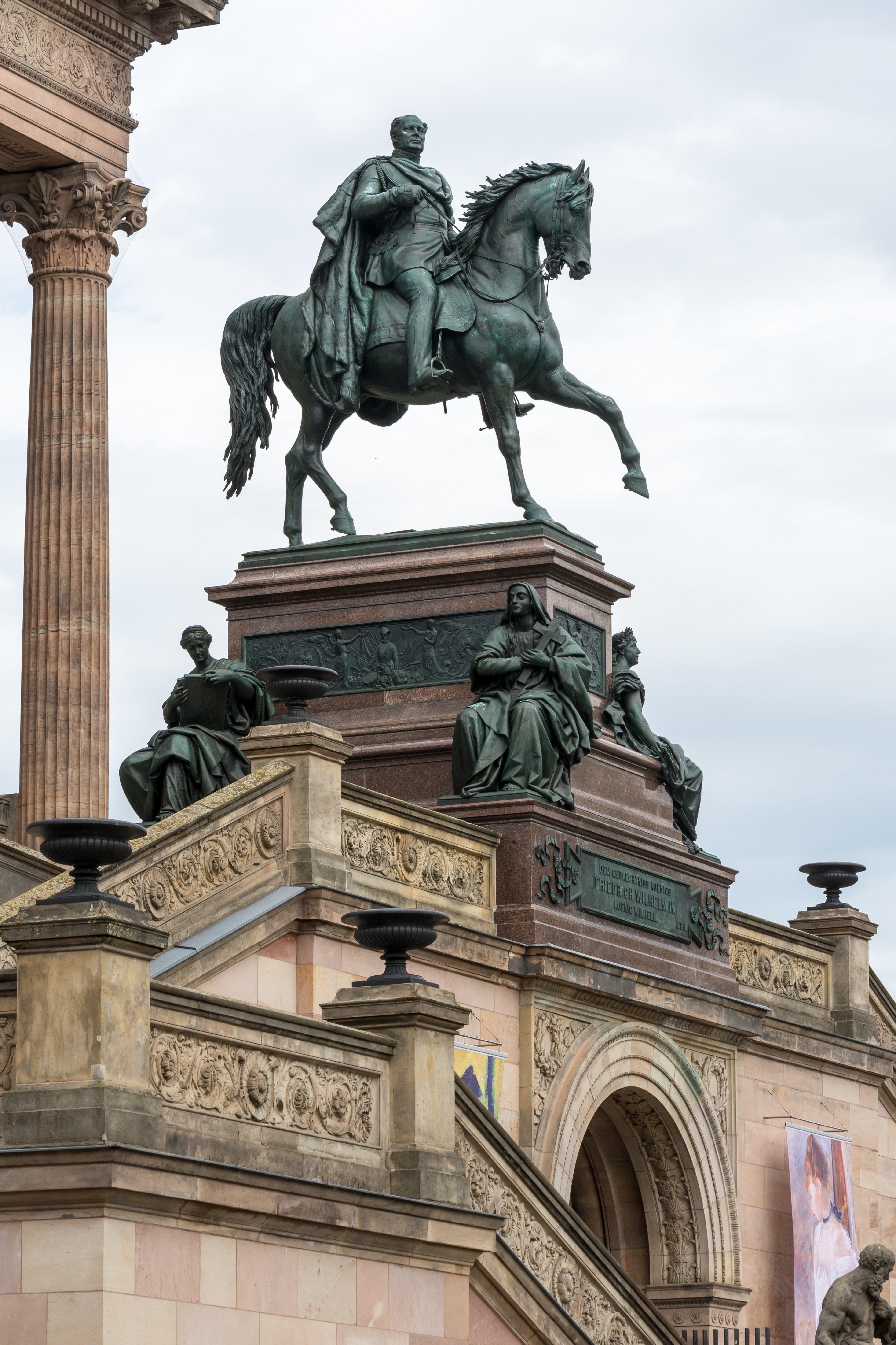 Reiterstandbild Friedrich Wilhelm IV. vor der Alten Nationalgalerie in Berlin-Mitte. This is a photograph of an architectural monument.